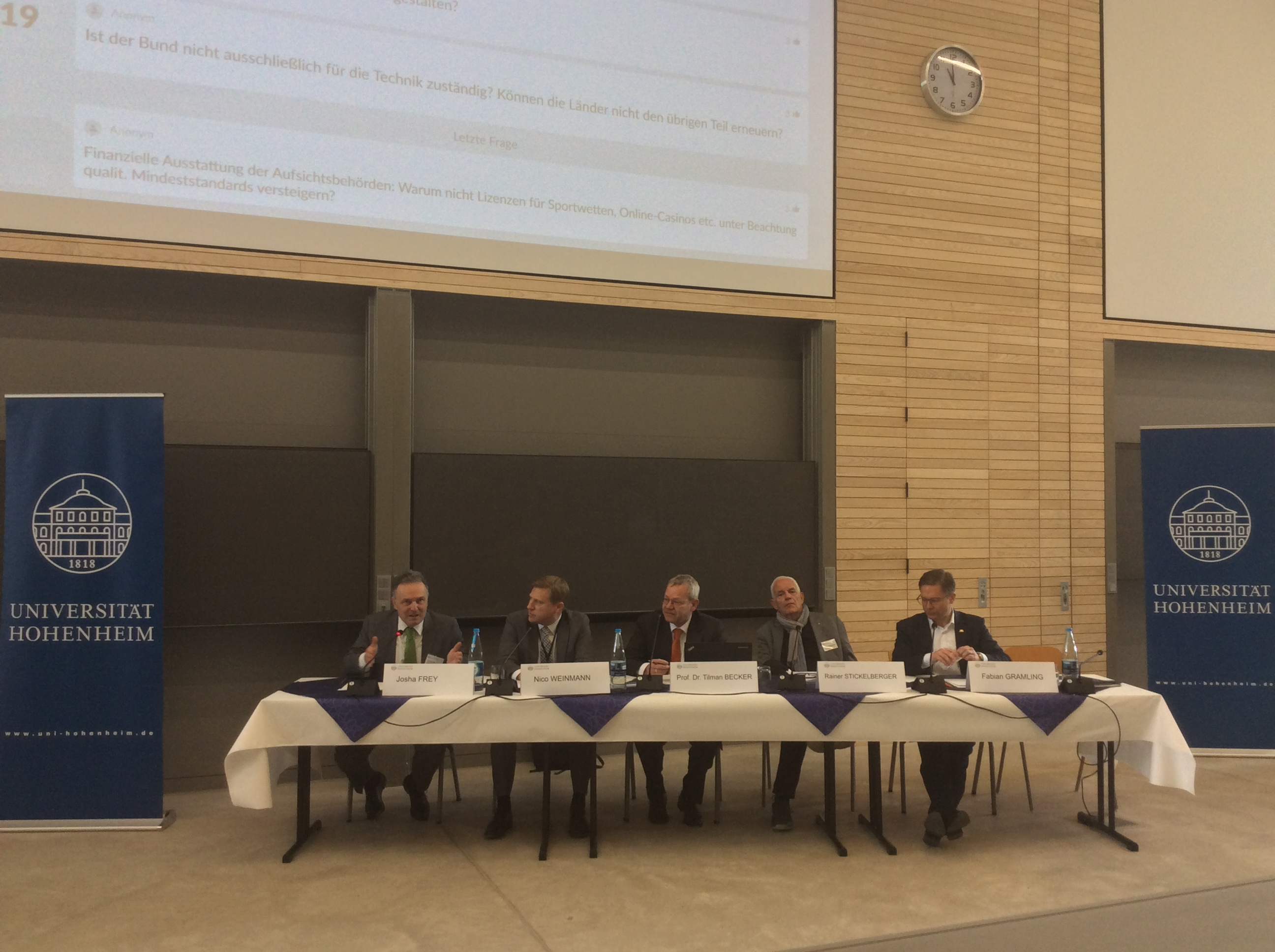 Podiumsdiskussion mit Vertretern der baden-württembergischen Landtagsfraktionen beim Glücksspiel-Symposium 2019 der Universität Hohenheim: Josha Frey, Nico Weinmann, Tilmann Becker, Rainer Stickelberger, Fabian Gramling